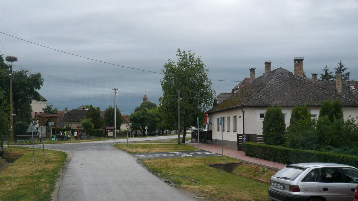 Beregdaróc látképe az Alkotmány út, Rákóczi út sarokról